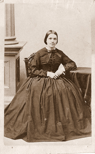 Sarah Fuller (1836-1927)